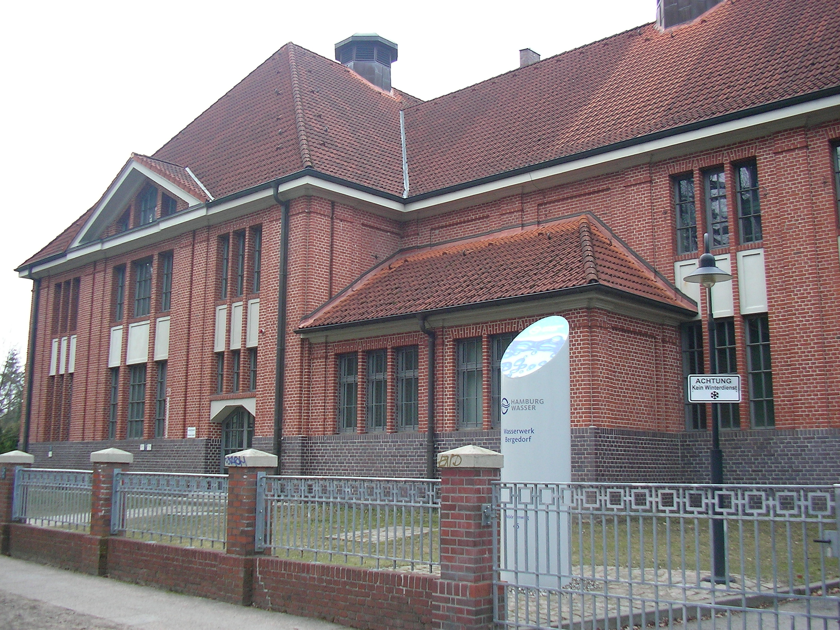 Wasserwerk Bergedorf; Bergedorf, Wasserversorgung in Hamburg